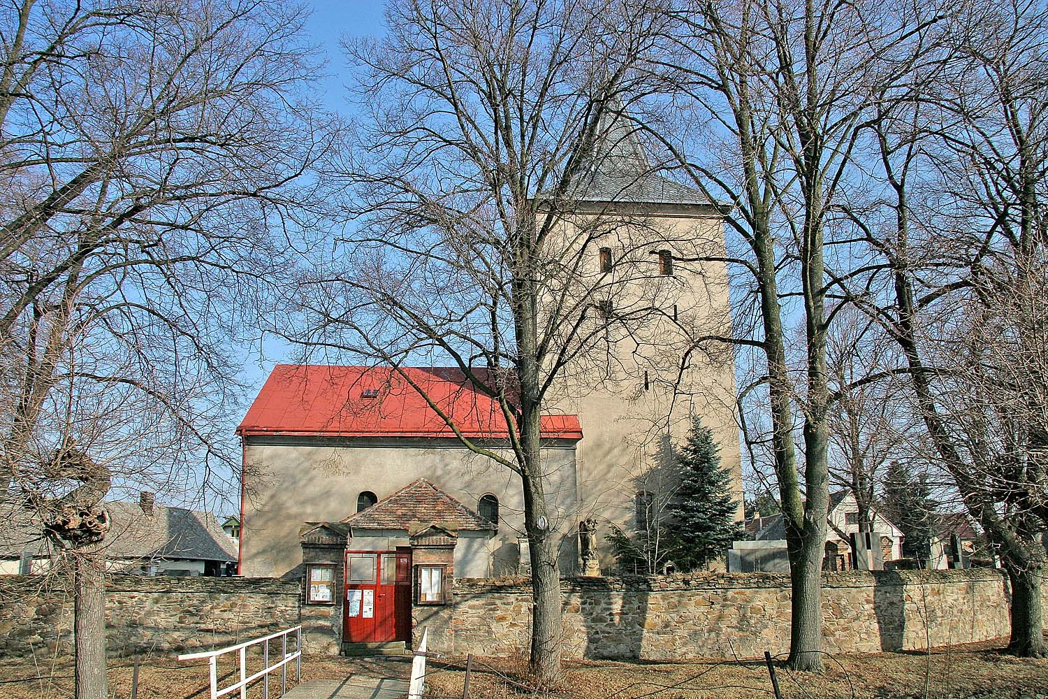 Původně gotický kostel Svaté Kateřiny ve vesnici Svatá Kateřina u Kutné Hory